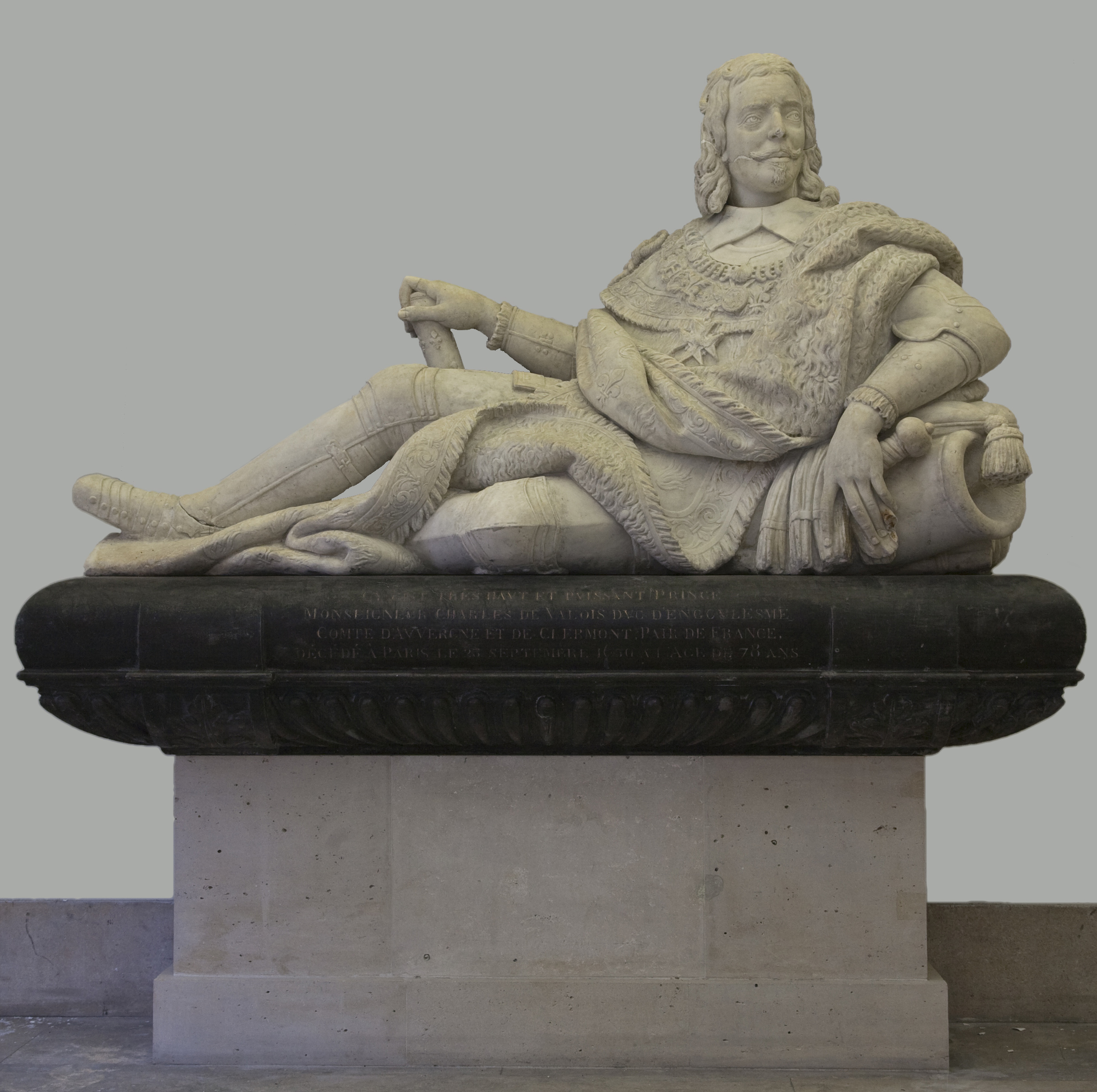 Pierre II Biard : Charles d'Angoulême (1573-1650), effigie funéraire, 1661, Bibliothèque historique de la Ville de Paris, Hôtel d'Angoulême et Lamoignon, rue Pavée, Paris, France.